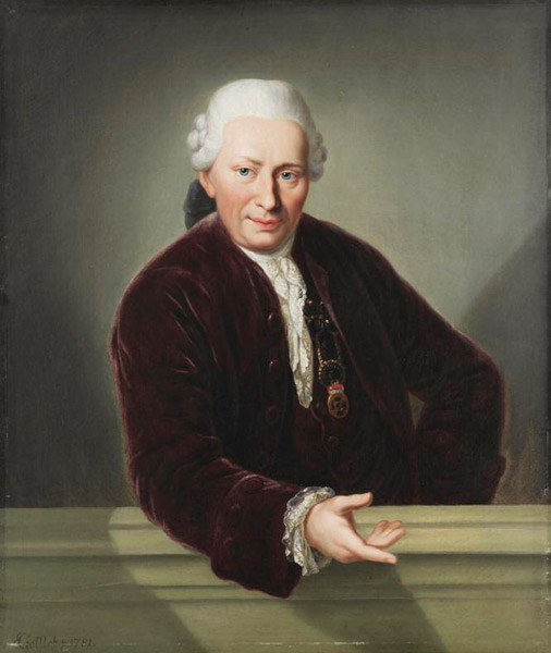 Portrait des Juristen Carl Ferdinand Hommel